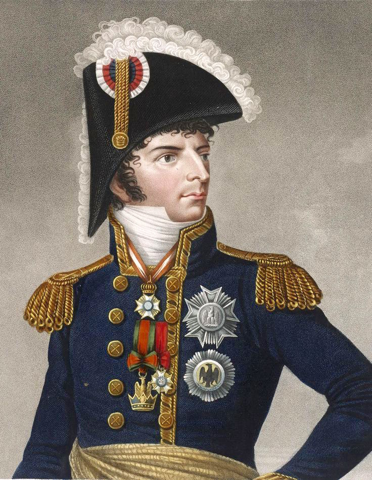 Jean-Baptiste Jules Bernadotte, maréchal d'Empire et roi de Suède sous le nom de Charles XIV Jean.